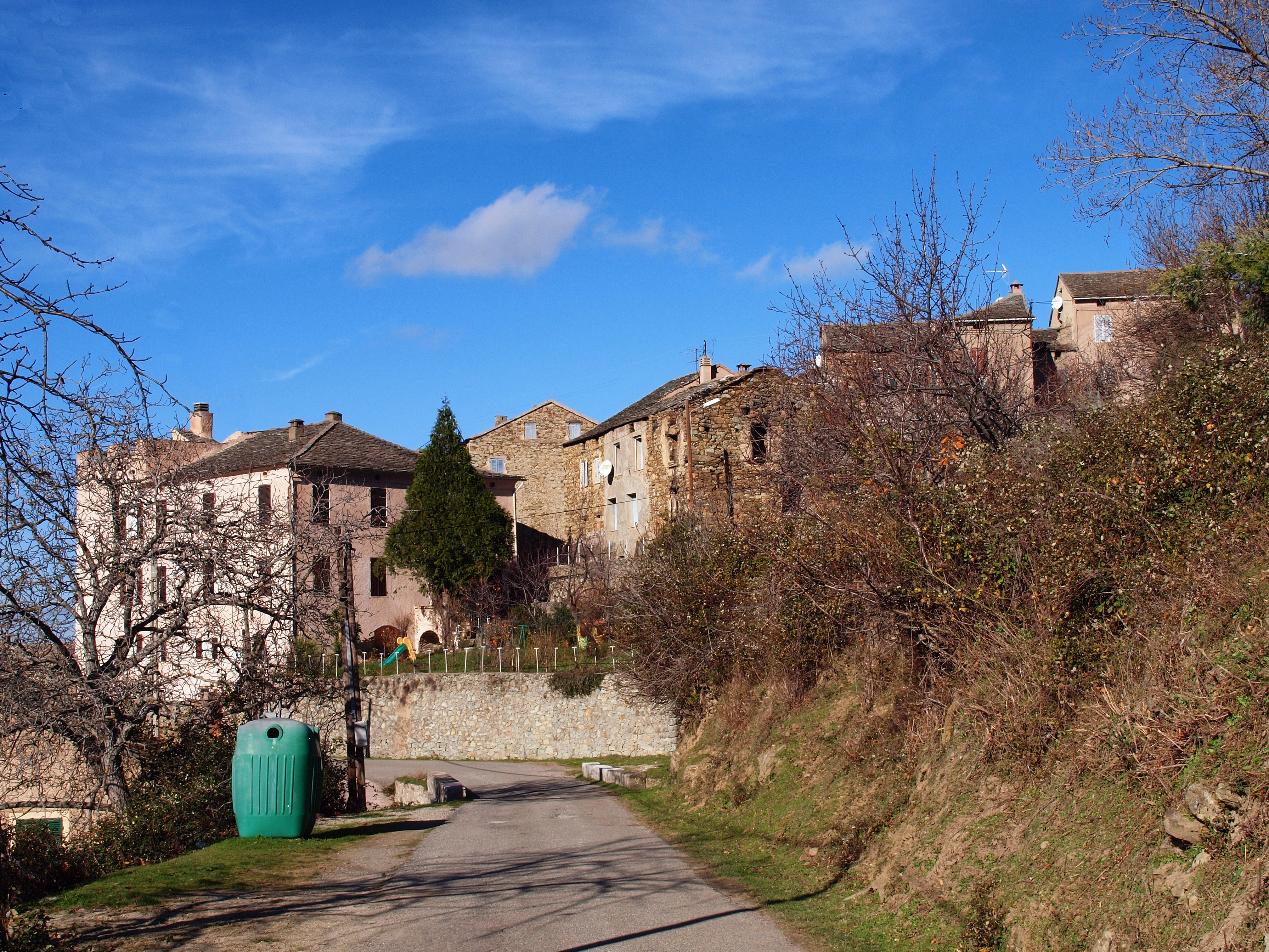 Gavignano, Casaluna (Haute-Corse) - Entrée du hameau de Poggio par la route D639